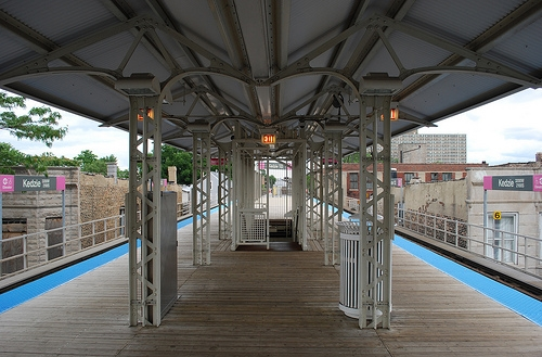 Photo de Kedzie sur la rose